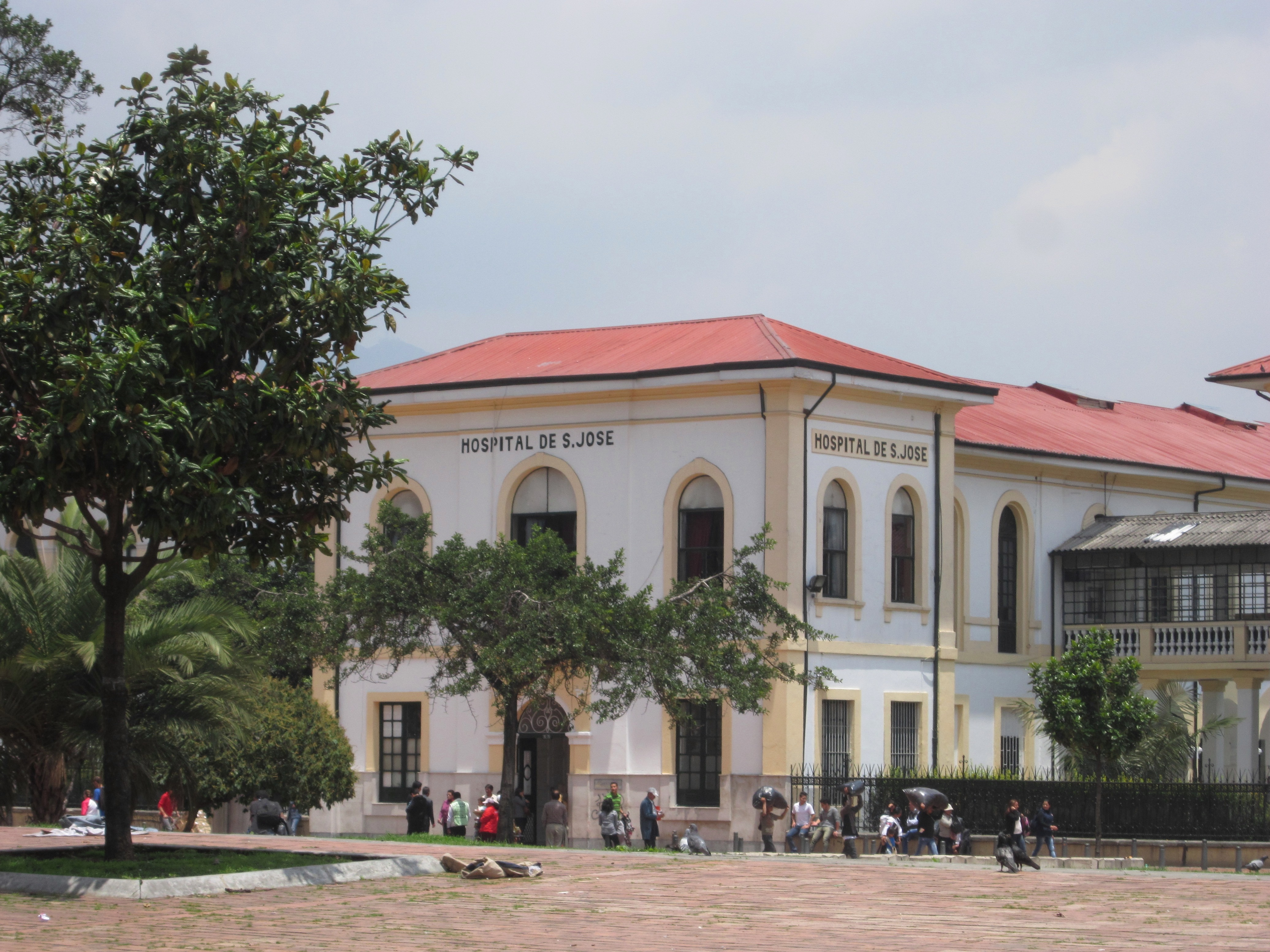 Hospital de San José, plaza España, centro de Bogotá.